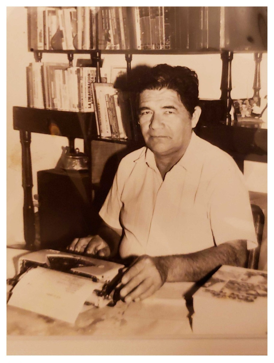 1986 cuando Waldemar Soria Rodríguez laboraba como Jefe de Relaciones Públicas en la Municipalidad Provincial de Coronel Portillo en el Dpt. de Ucayali